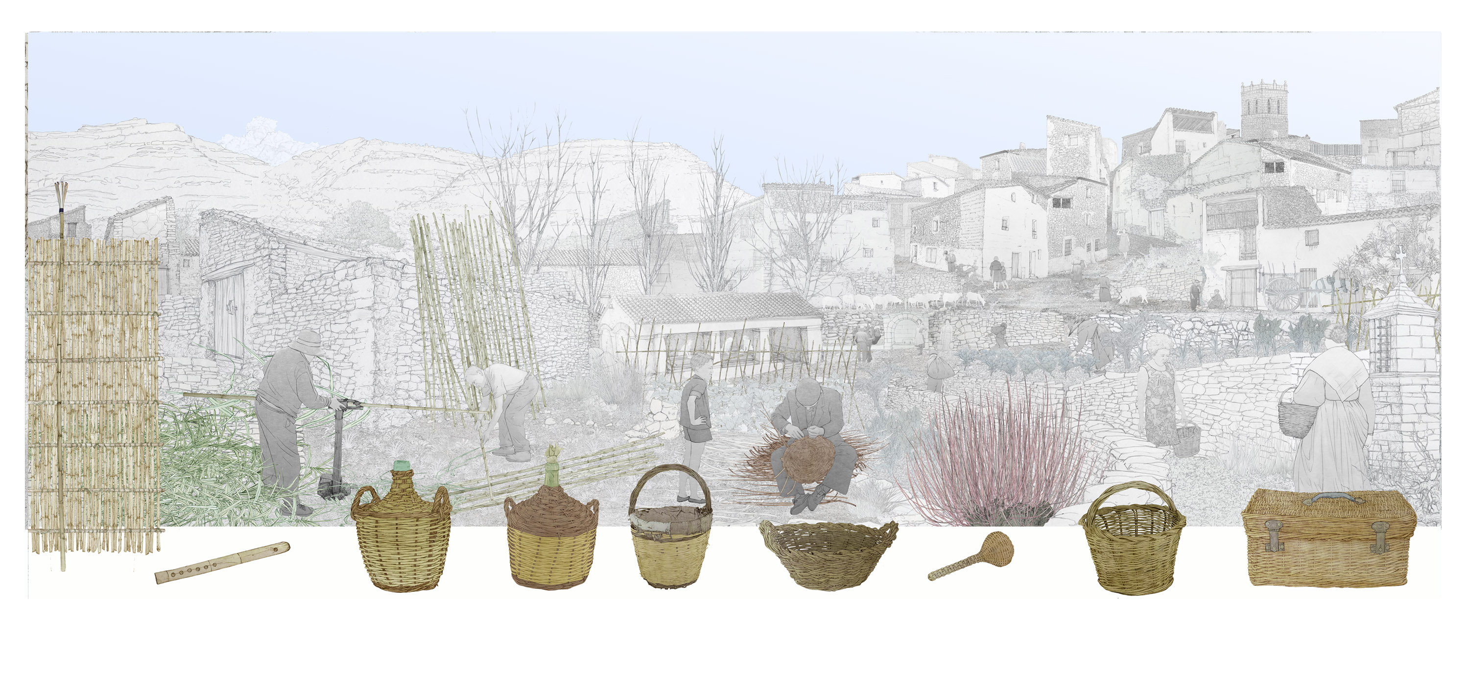 Il·lustracions d'Andrés Marín Jarque per a l'exposició permanent "Secà i Muntanya" del Museu Valencià d'Etnologia. S'il·lustren els escenaris del medi rural i el procés (treball) mitjançant el qual s'aprofita este espai.